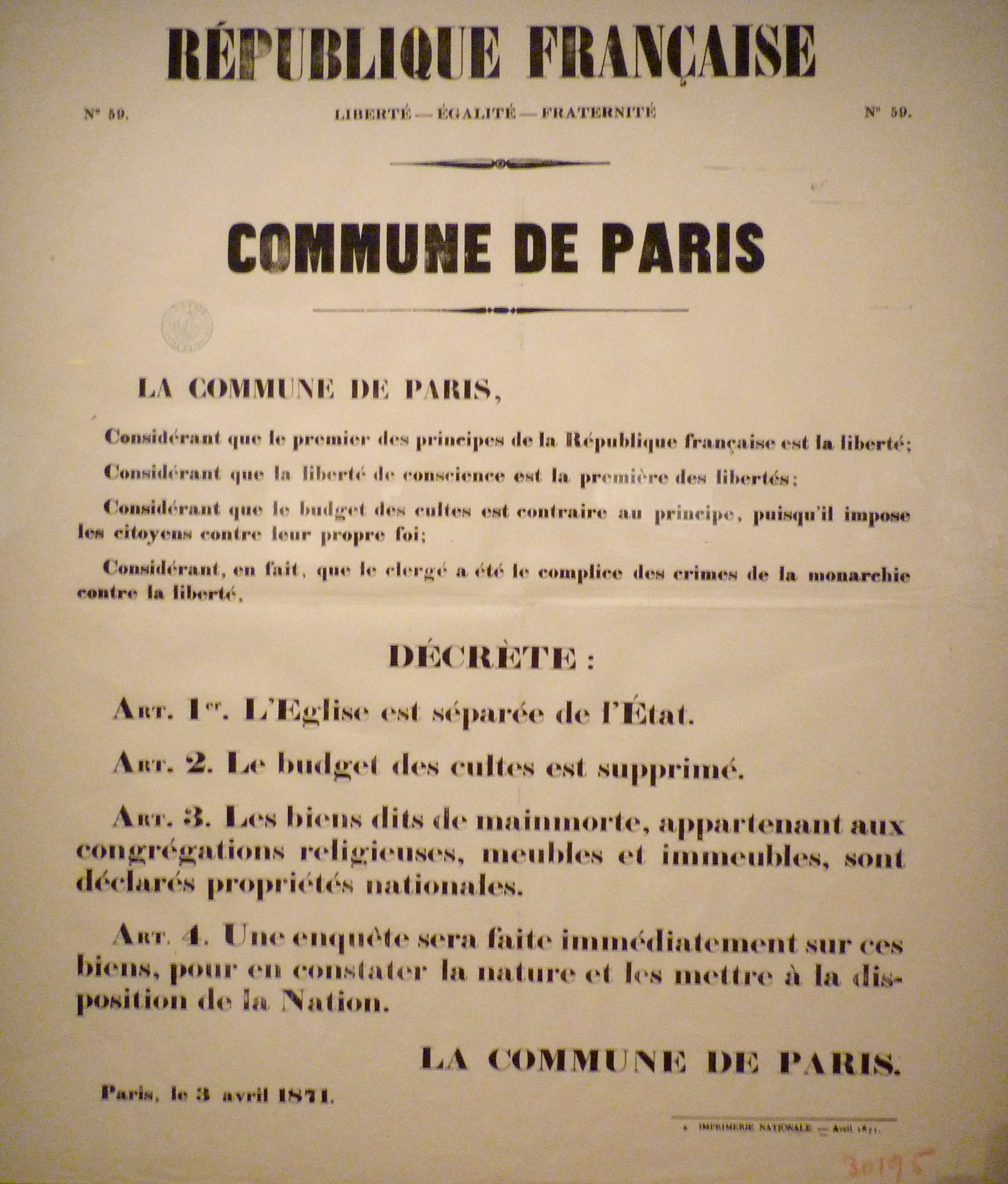 Exposition La Commune de Paris à l'Hôtel de Ville de Paris (18 mars - 28 mai 2011) - Affiche sur le décret du 3 avril 1871 déclarant la séparation de l'église et de l'état - Bibliothèque historique de la Ville de Paris.